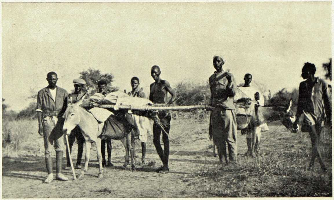 Transport nebožtíkova těla do tábora. Jižní Súdán, 1911